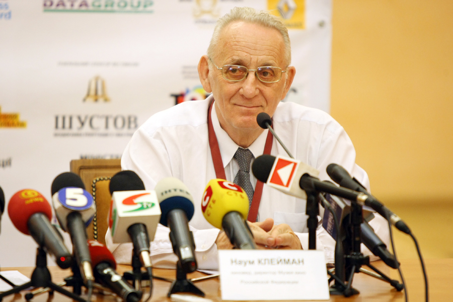 Наум Клейман на пресс-конференции по поводу показа «Броненосца Потёмкина» на Потёмкинской лестнице. Одесский международный кинофестиваль 2010. Depicted person: Naum Kleiman